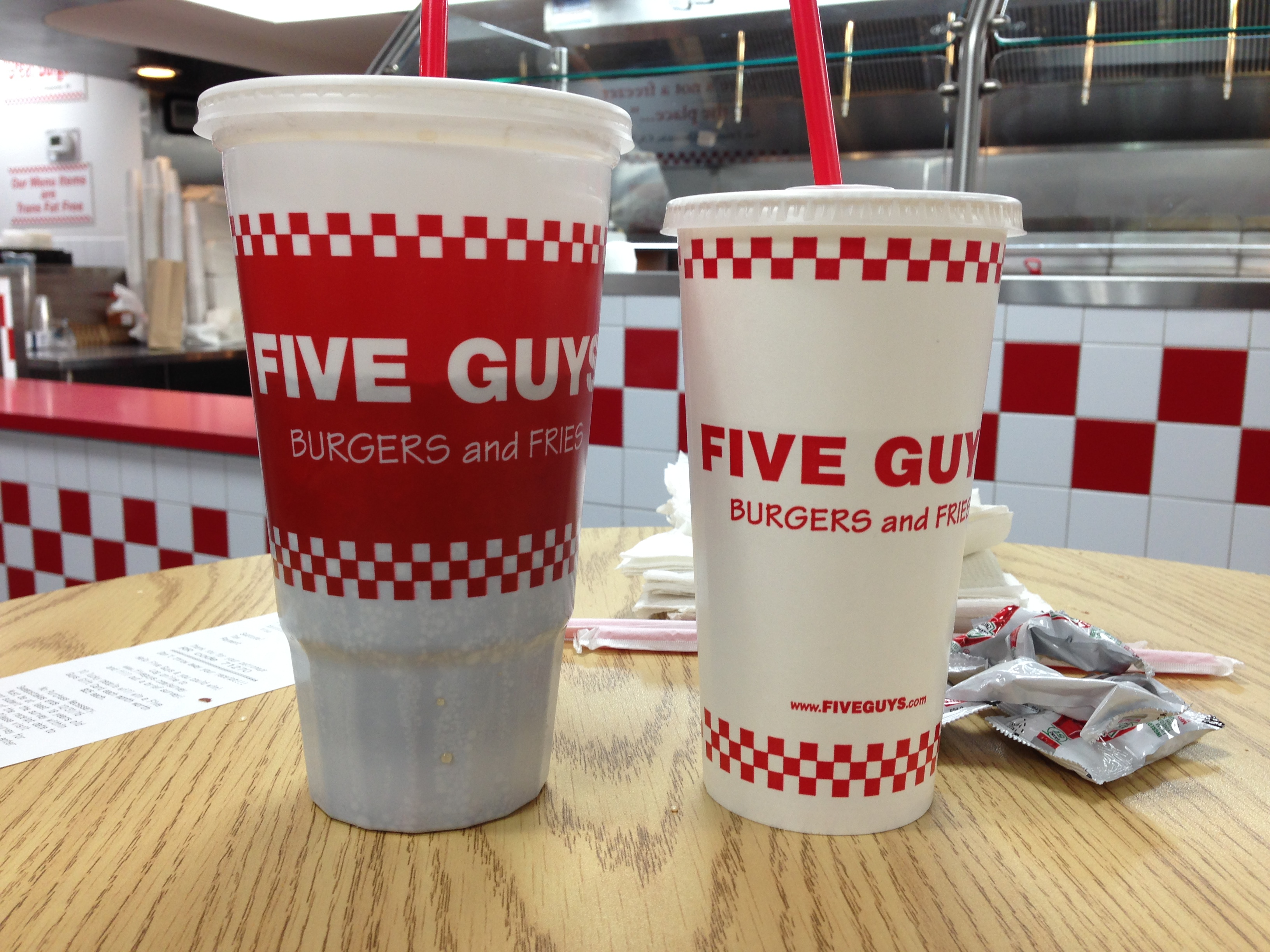 Bicchieri di Coca Cola col Marchio della catena Five Guys